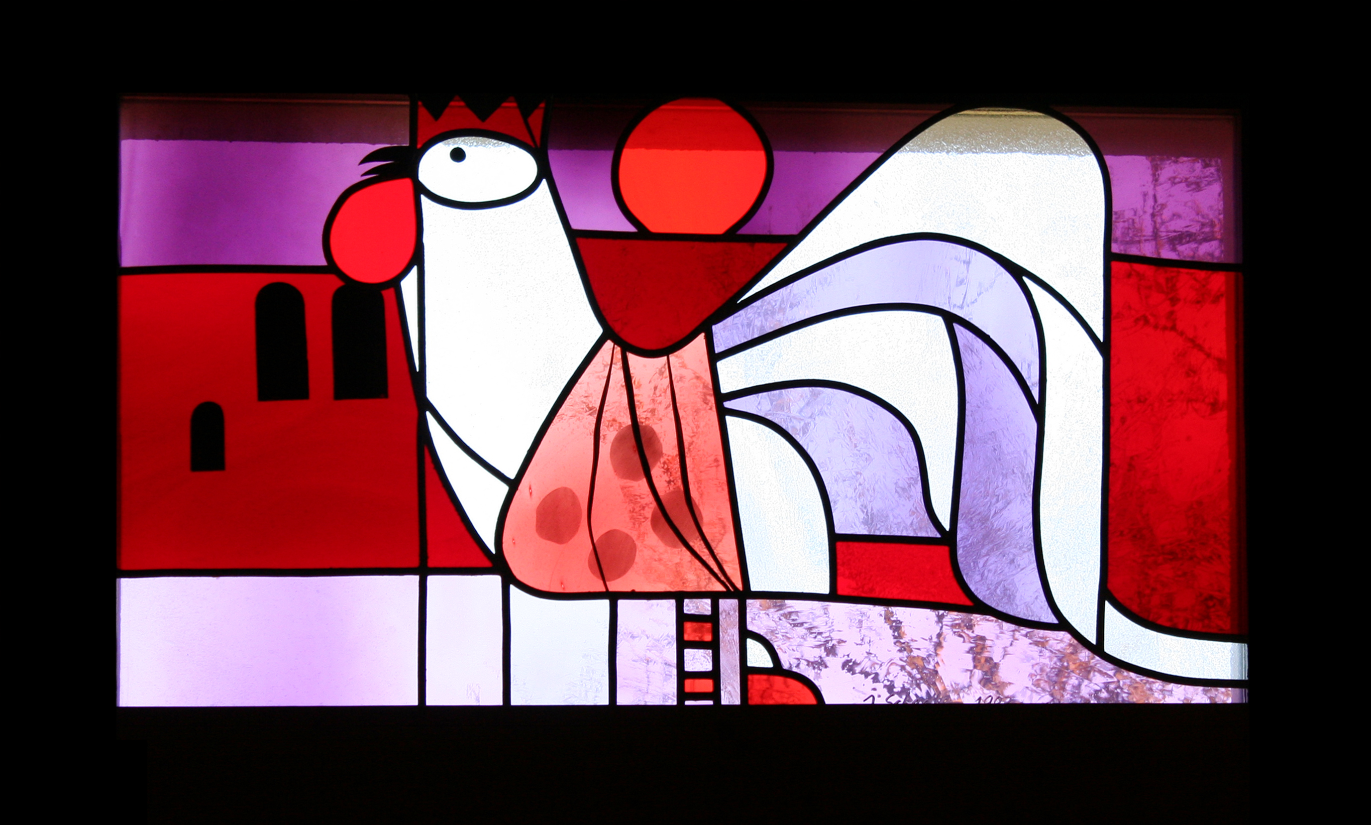 Römisch-katholische Kirche St. Josef Rickenbach-Sulz, Glasfenster von Jacques Schedler